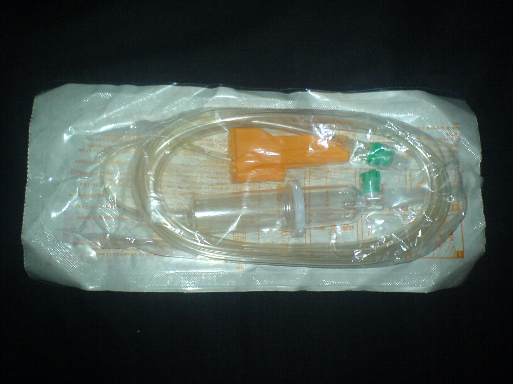 Infusionsbesteck